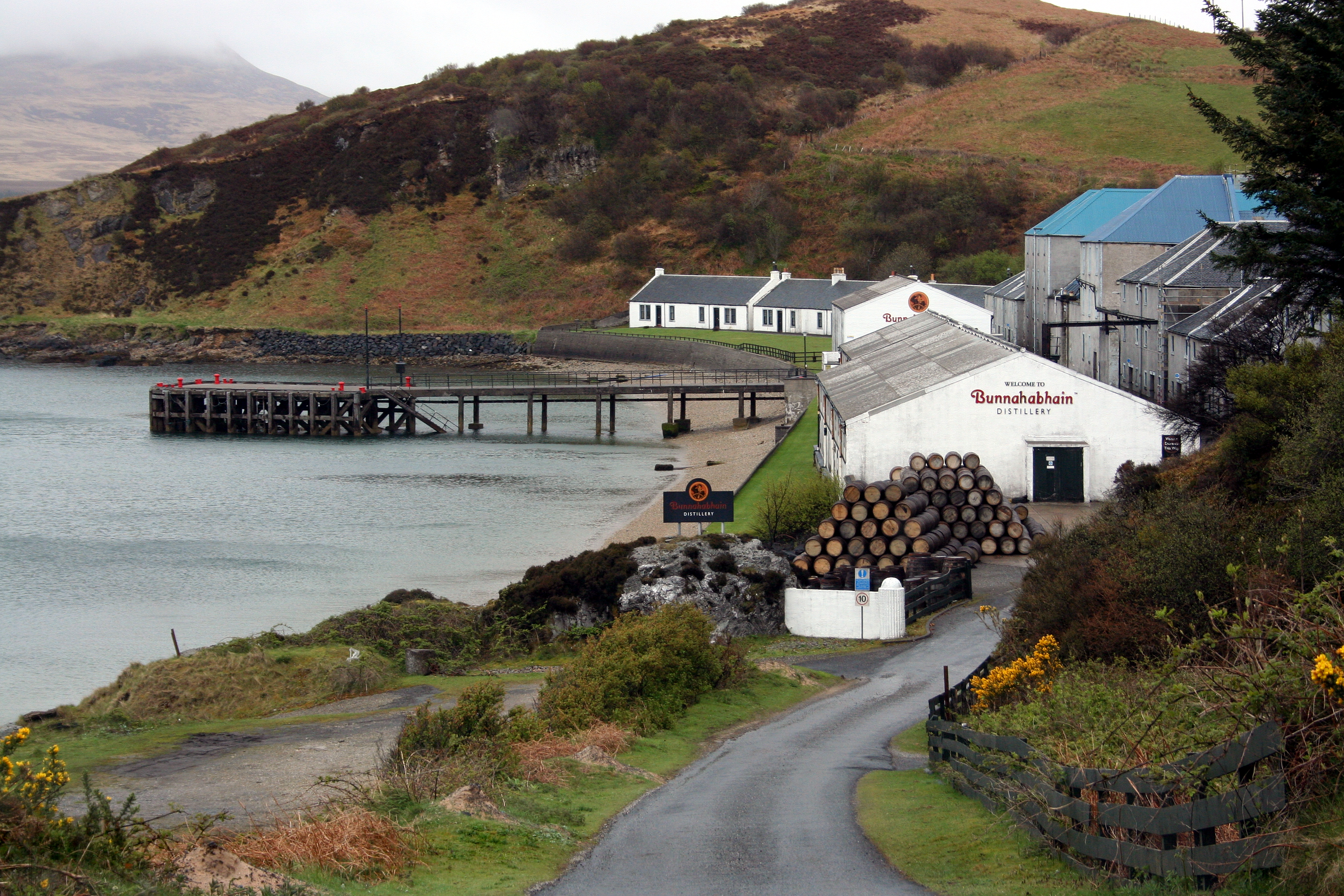 Blick auf die Bunnahabhain Distillery (Mehr Informationen).